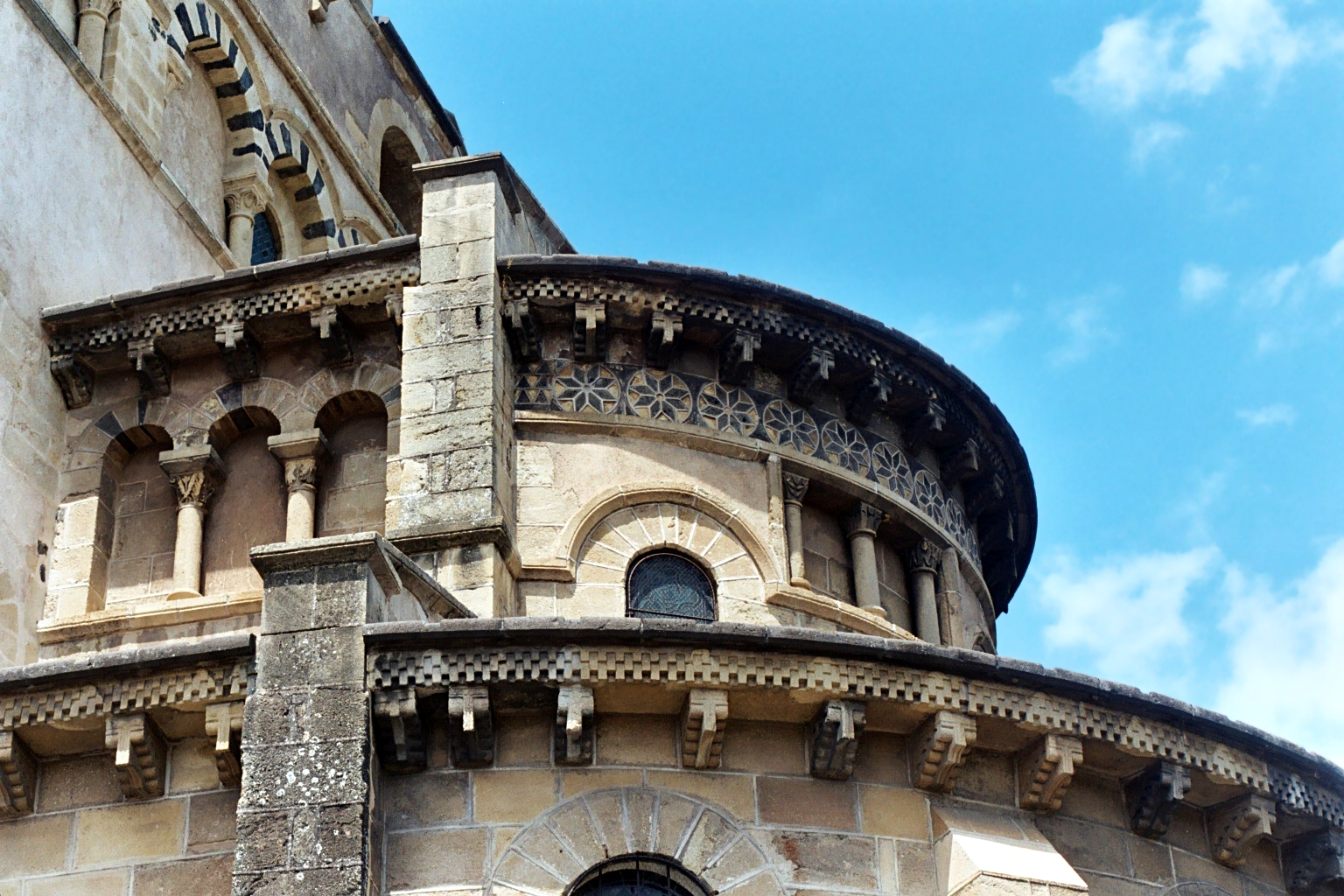 France - Auvergne - Puy-de-Dôme - Église Notre-Dame de Saint-Saturnin - Abside